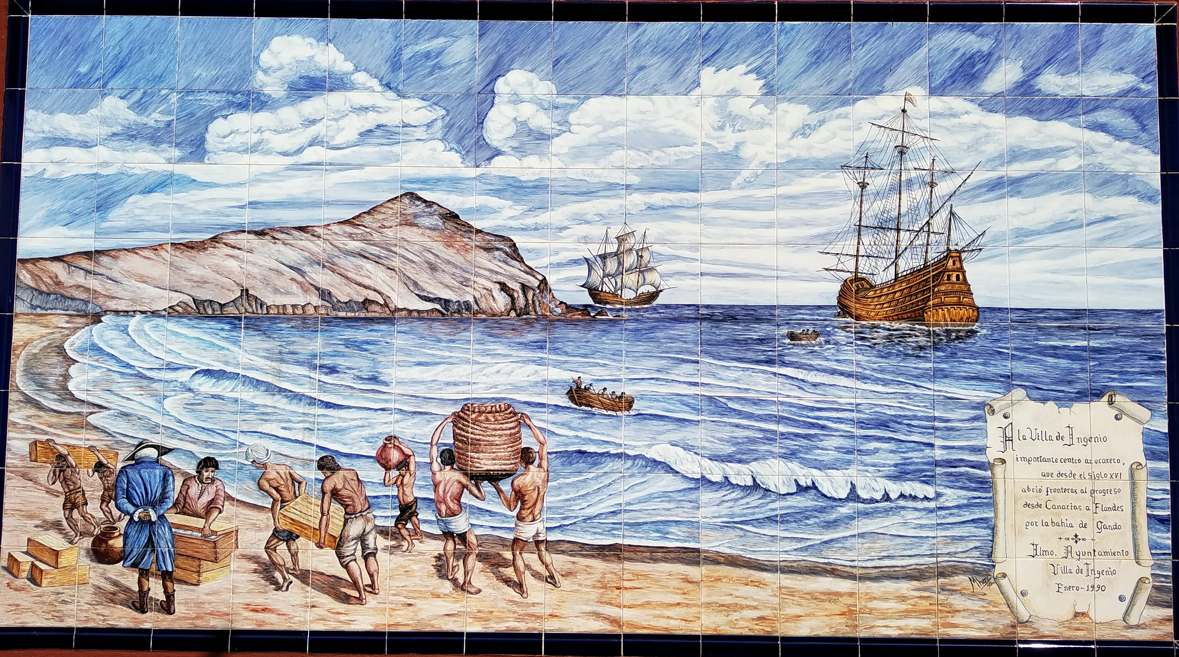 Representacion artistica del comercio de azúcar en la bahía Gando